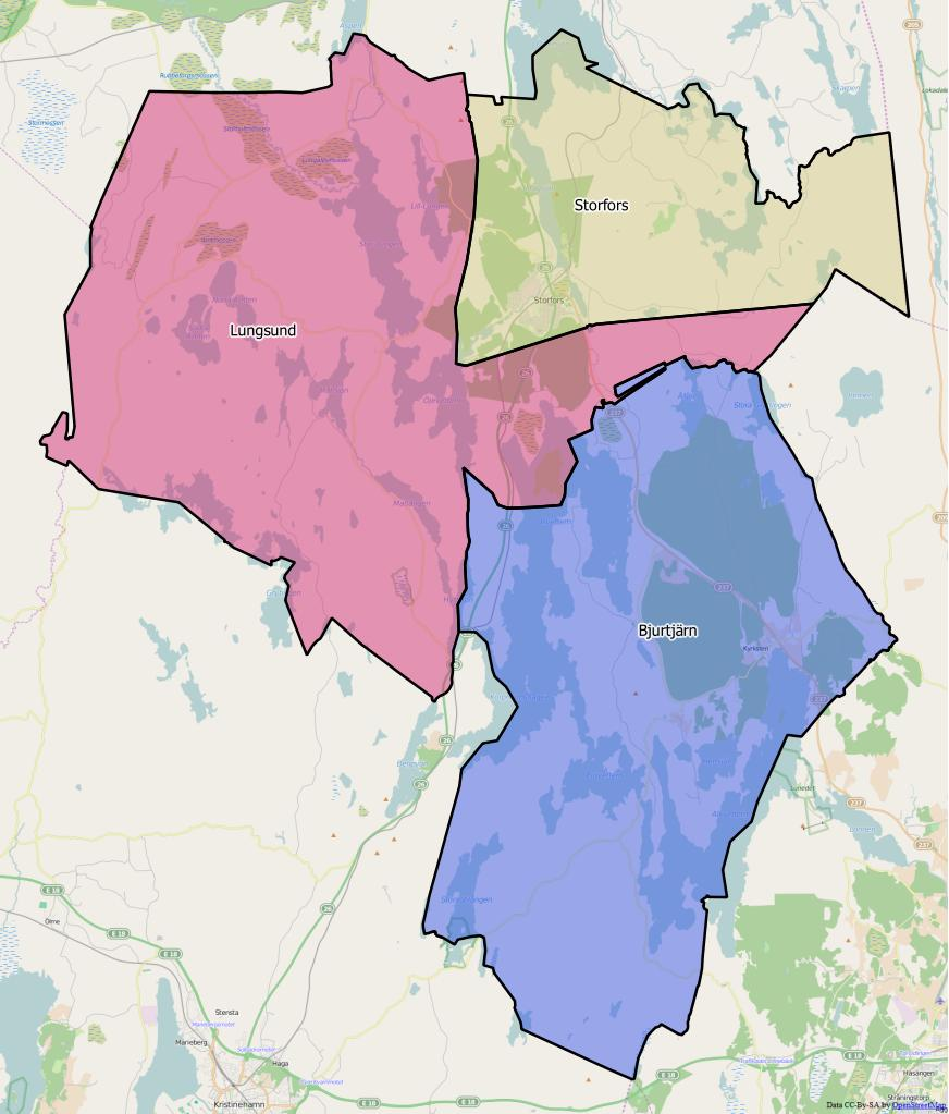 Distriktsindelningen i Storfors kommun World file: 65.91192342940706794 0 0 -65.91192342940706794 1556418.68350272858515382 8314776.7556722080335021